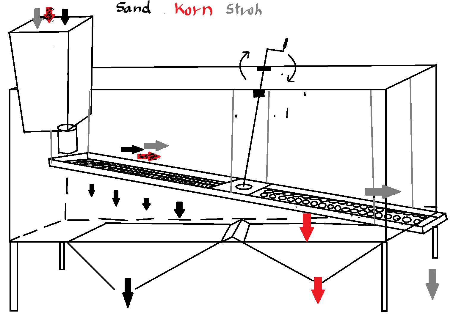 Das Getreide wird von Sand, Erde bzw. Stroh oder Steinen getrent in dem sie ausgesiebt werden.